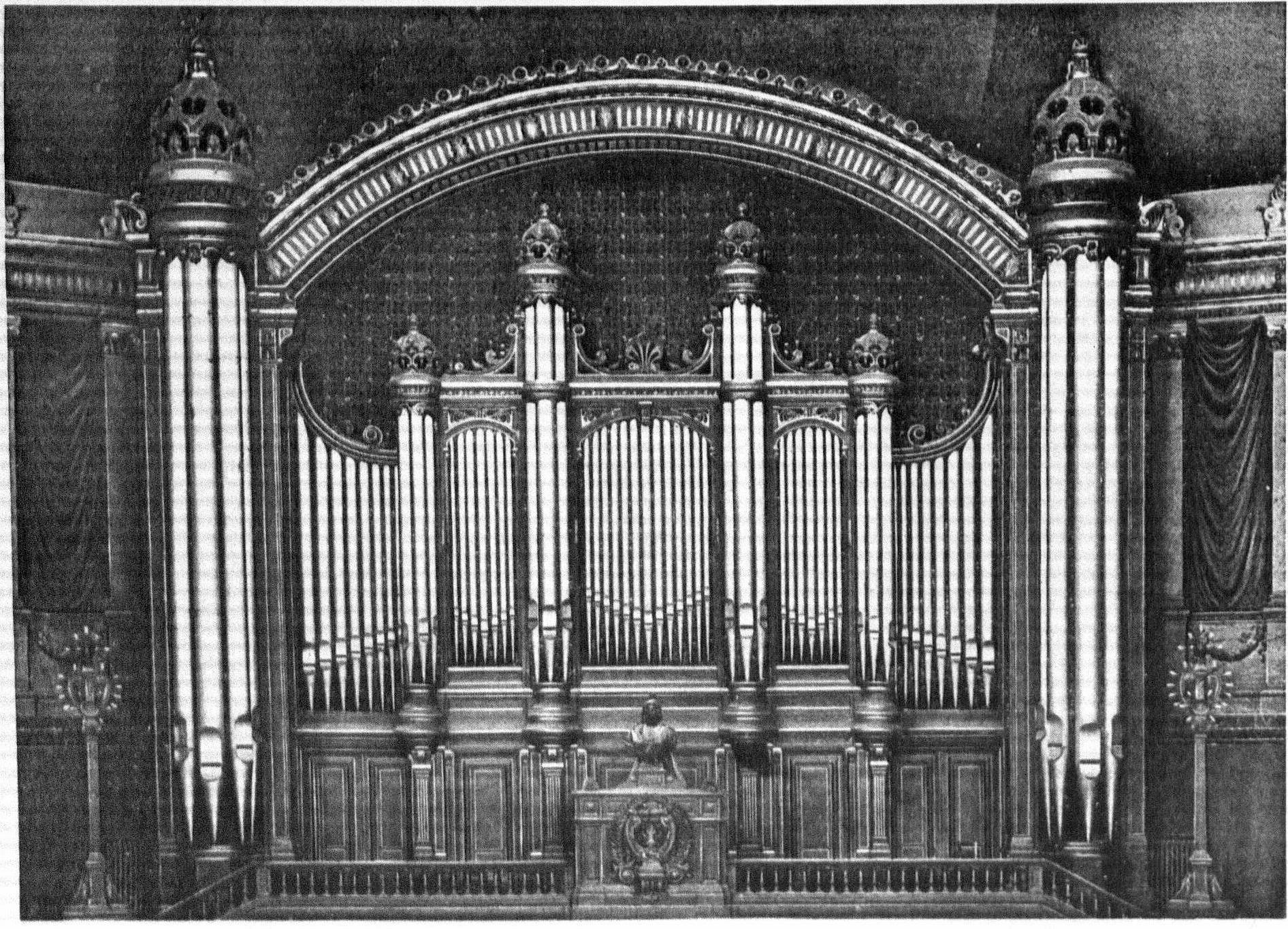 Les Orgues du Trocadéro 1878 (Extrait de: Alexandre Cellier: L'orgue moderne) (Delagrave. Editeur)